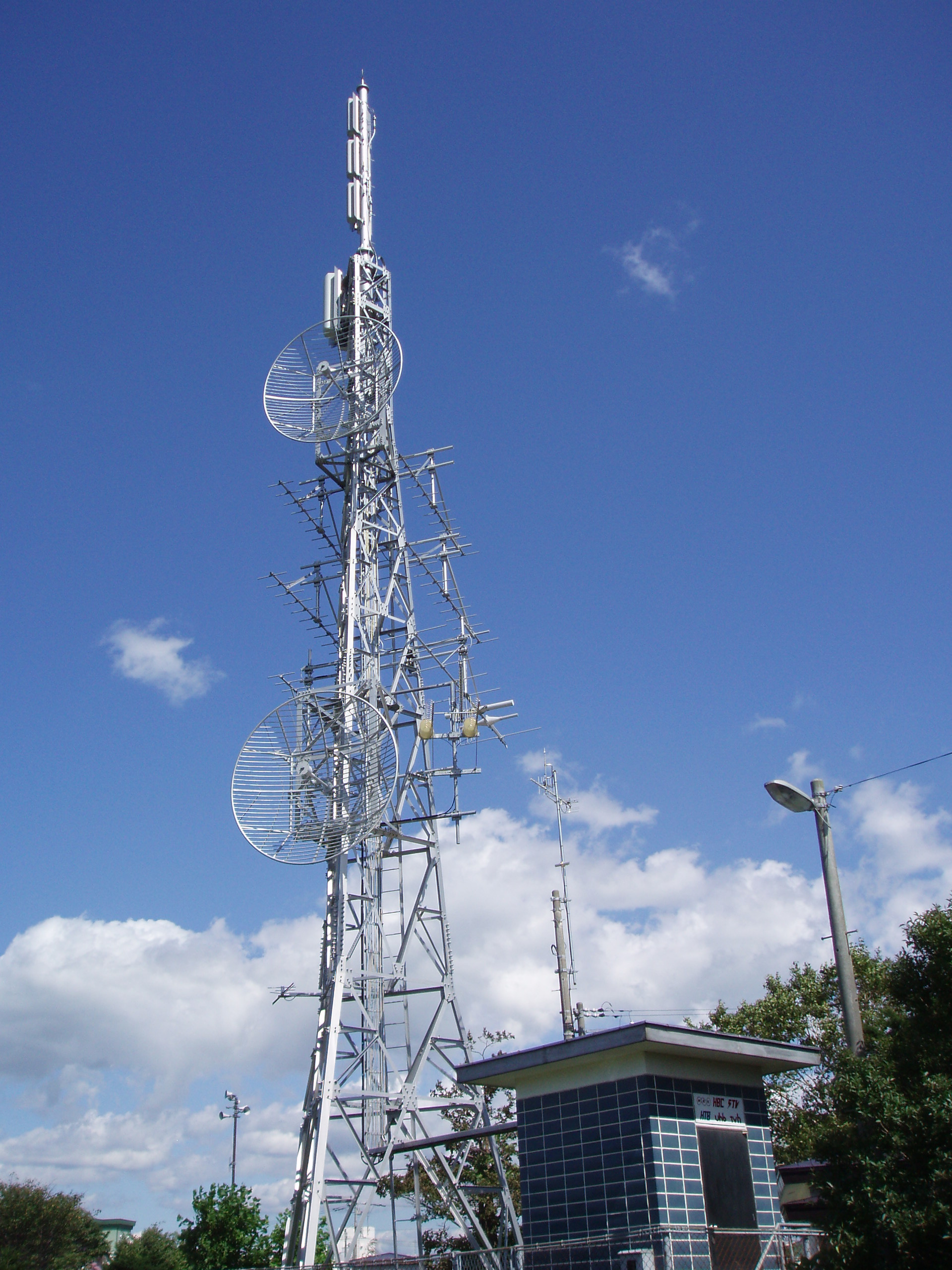 幌別中継局